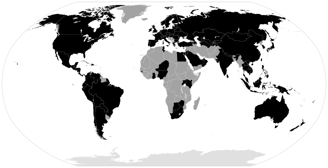 Availibility of Apple Music in the World updated from Akhenaten0 Wikipedia under creative commons 4 laws.